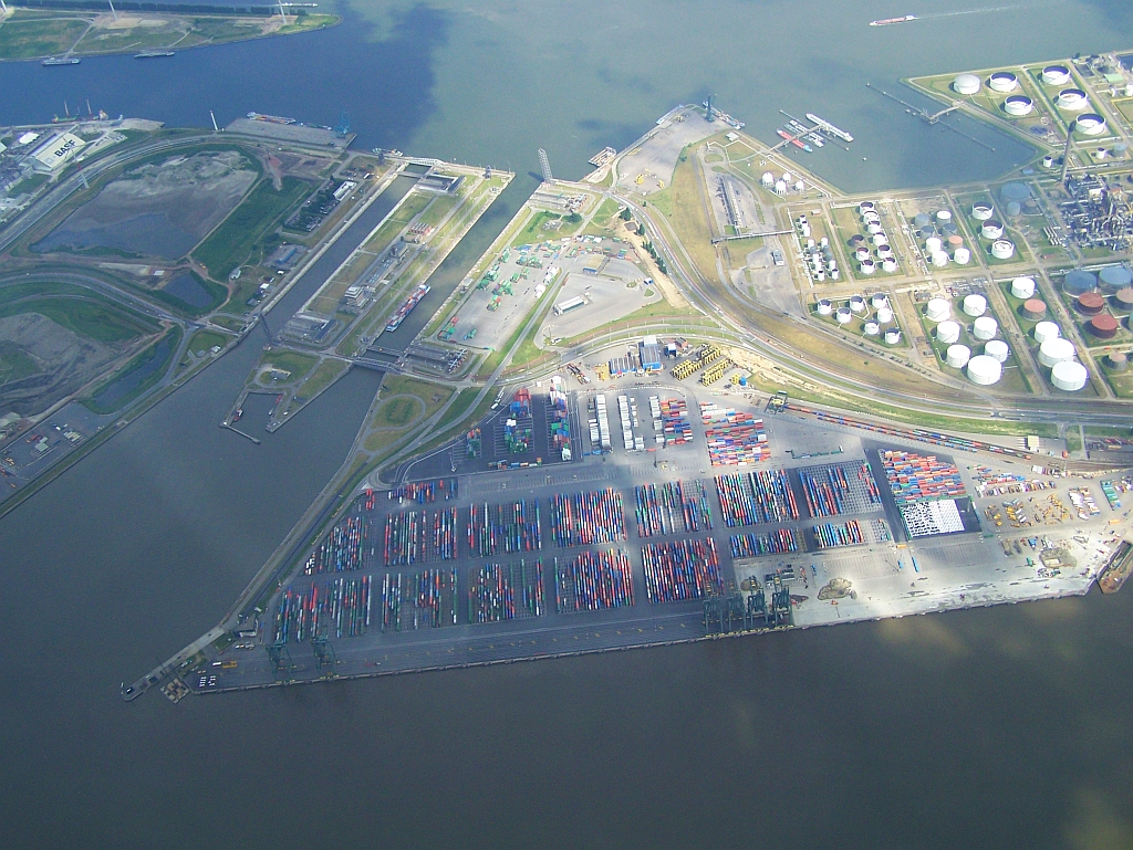 Sluizen